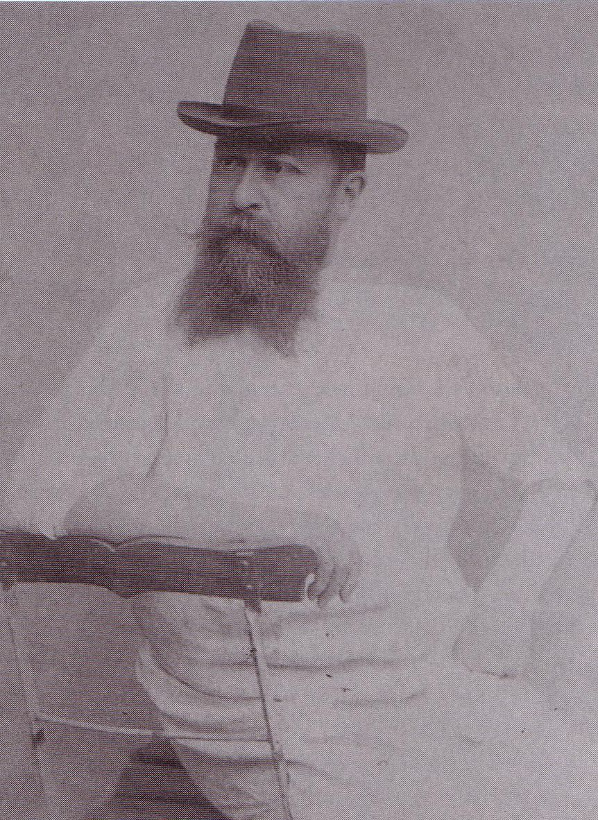 Fotografie des Paukarztes Dr. Krauß, Archiv des Corps Borussia Tübingen